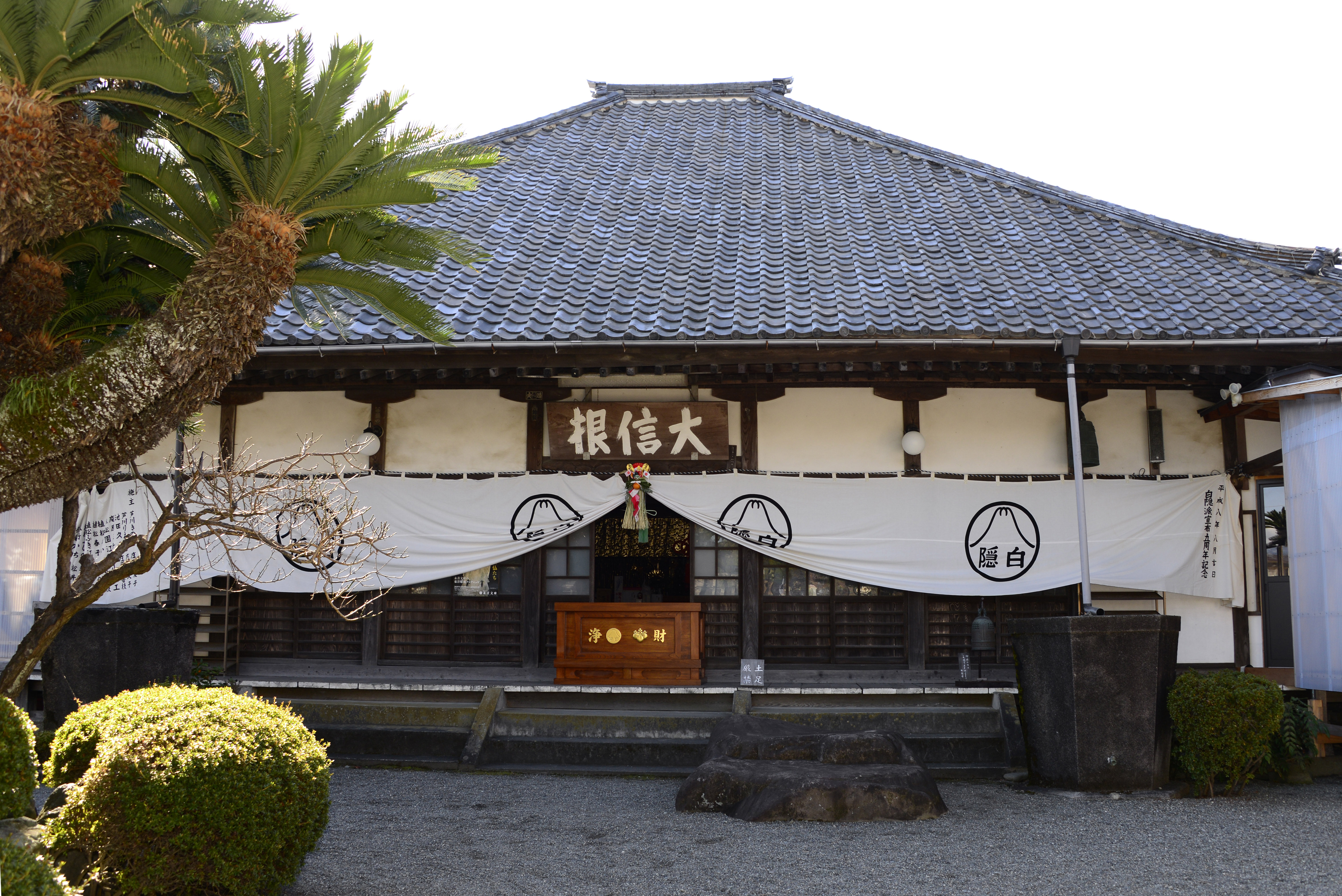 沼津市原の松蔭寺 本堂を正面から撮影